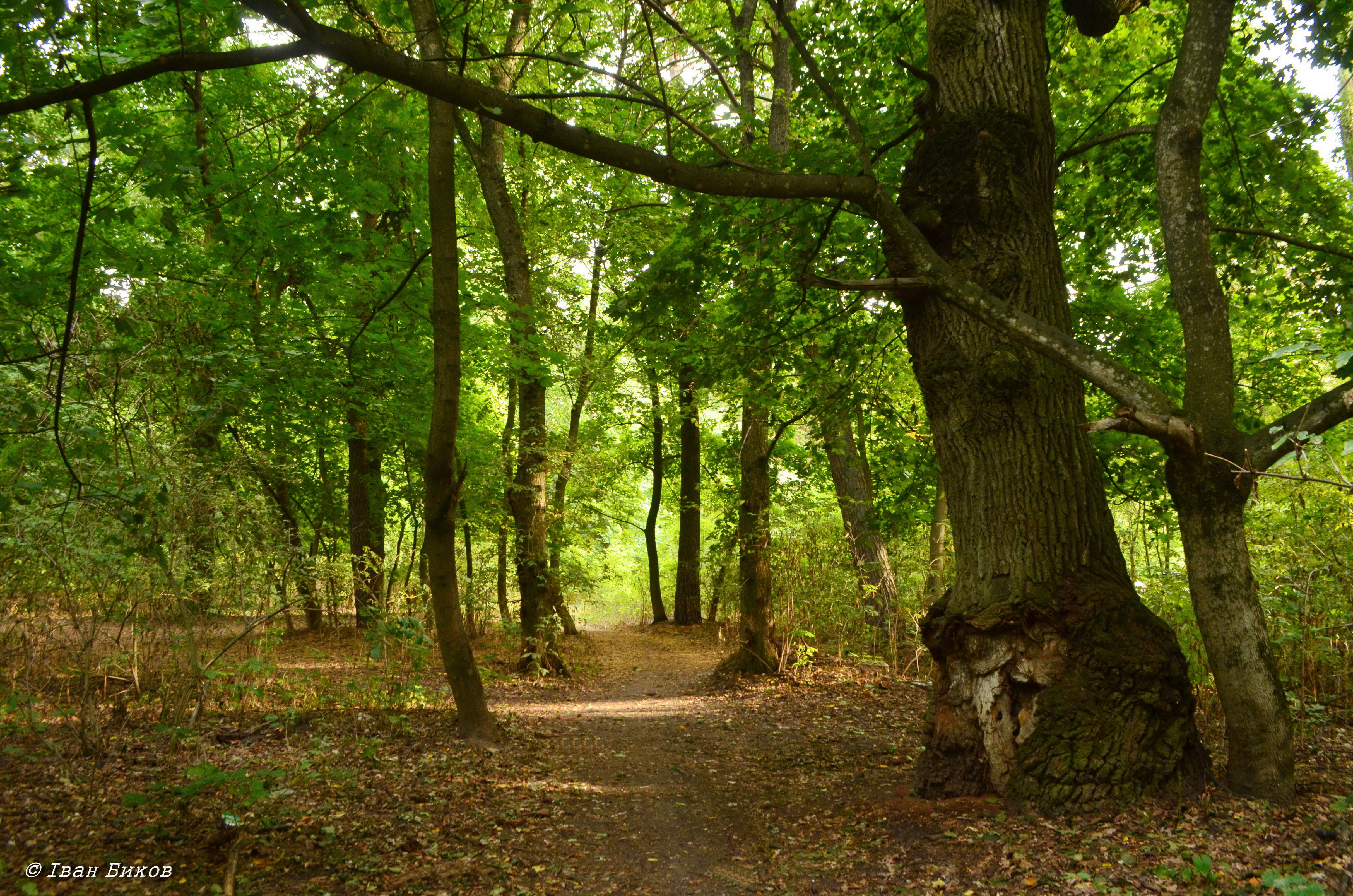 Парк-пам'ятка садово-паркового мистецтва садиби І.М. Терещенка (16,0 га), село Шпитьки